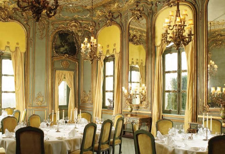 La sala da pranzo francese (Bloseries)